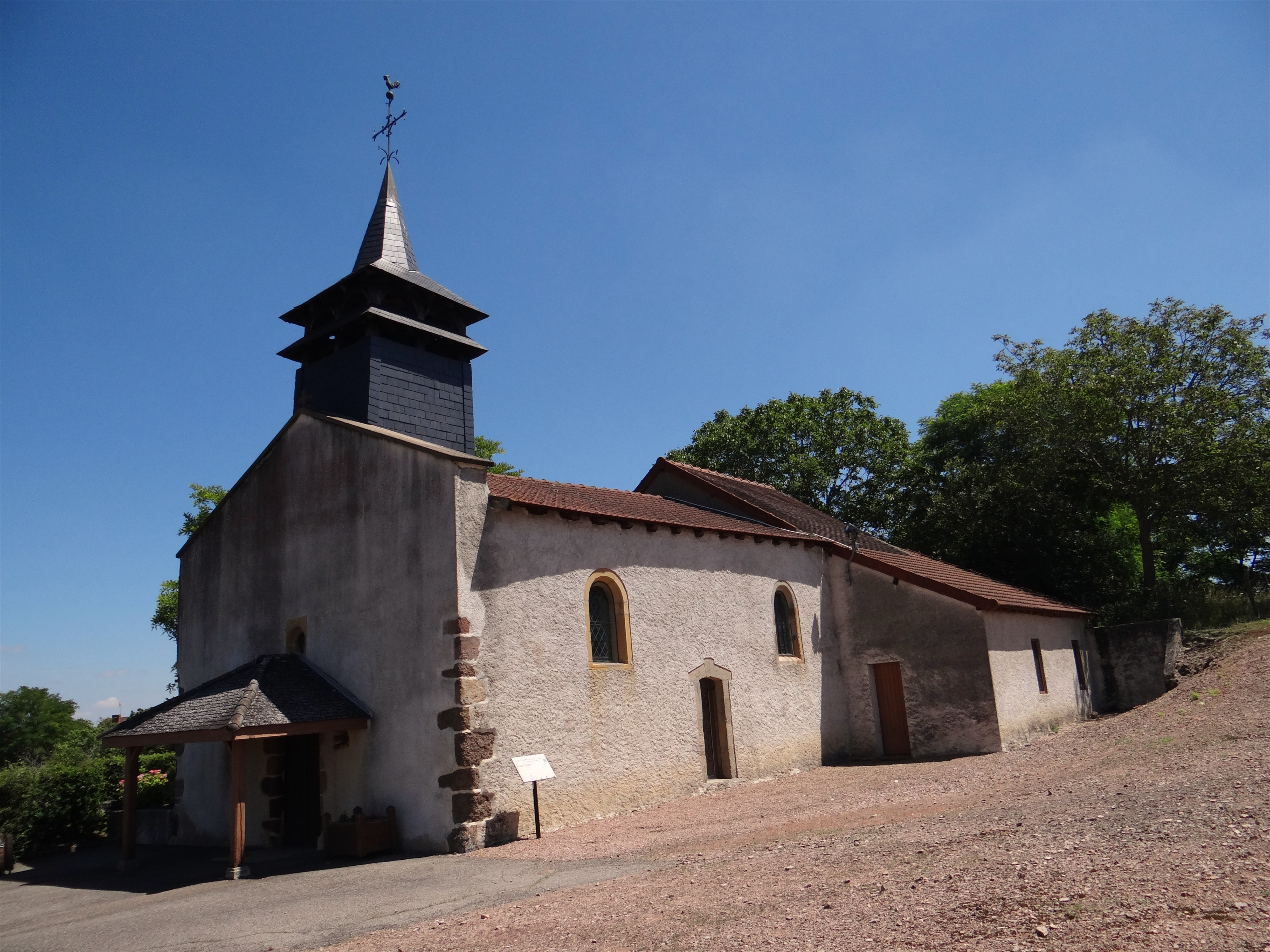 Église Saint Christophe, Le Pin, Allier, France.